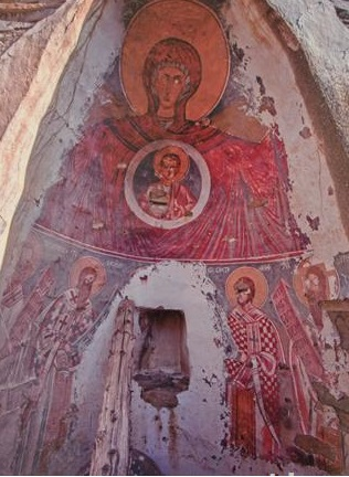 Фреска на Исус Христос во црквата во село Убого, неготинско